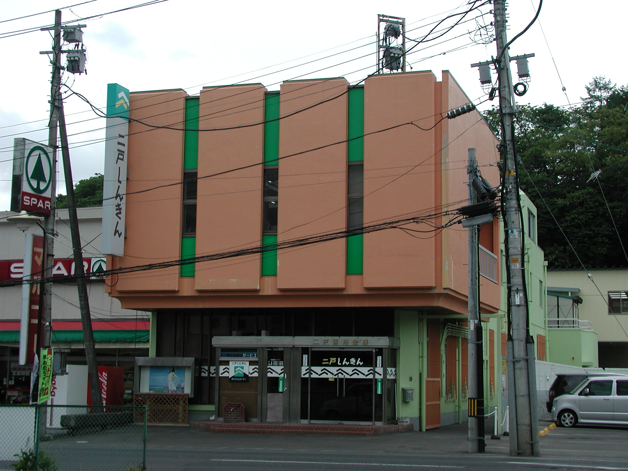 二戸信用金庫 本店（店番：001）